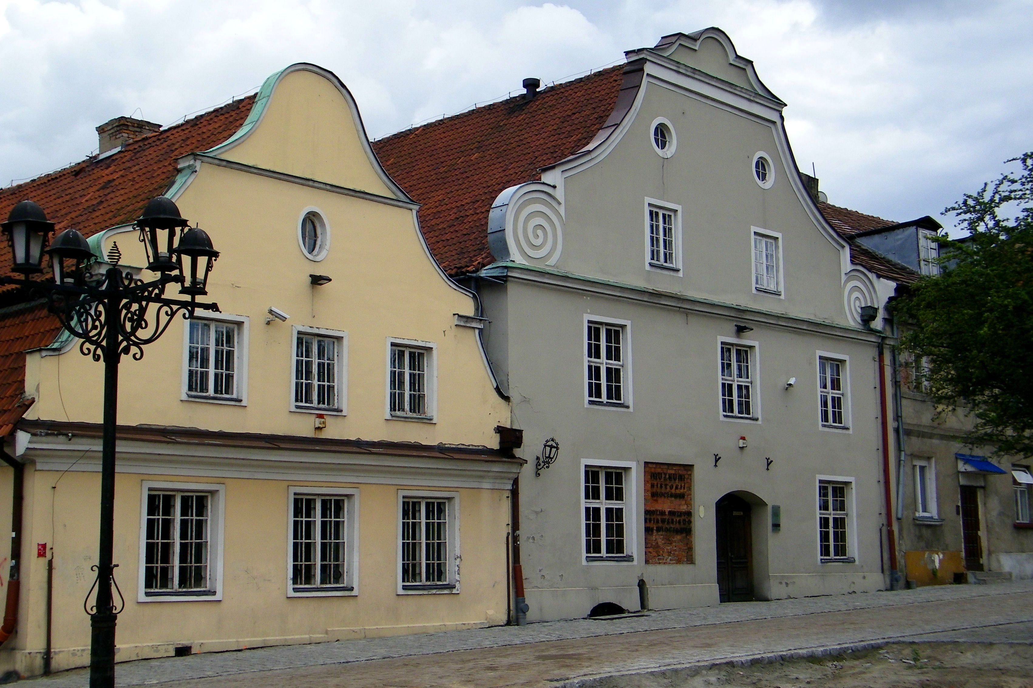 Kamieniczki XVI-XVIII Stary rynek 14-15 Włocławek